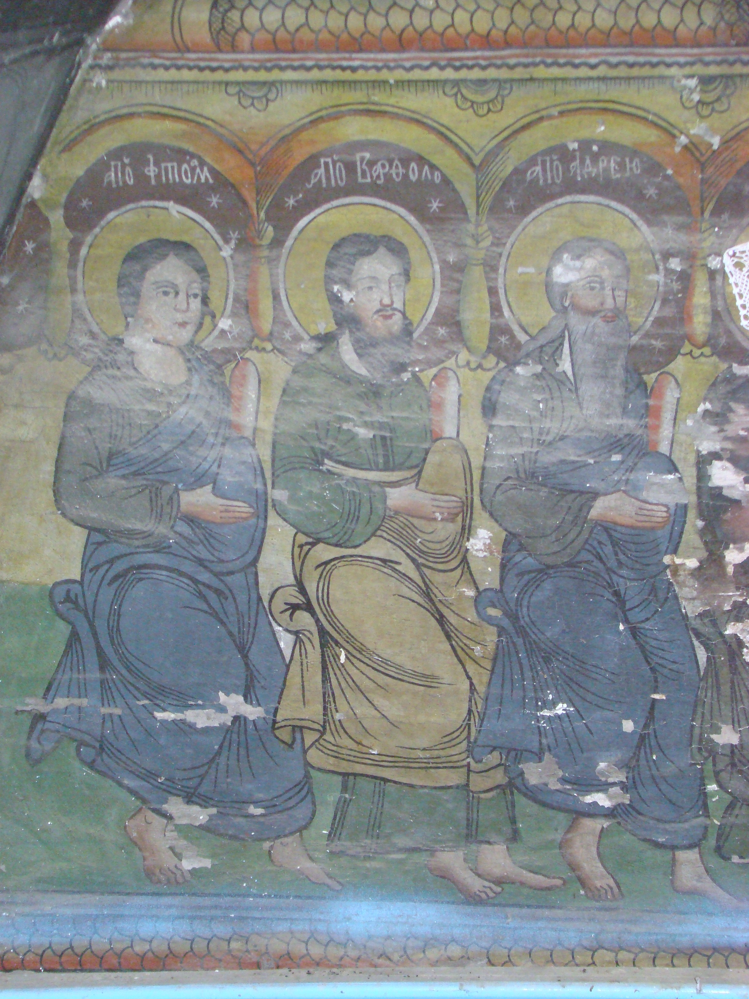 Biserica de lemn “Învierea Domnului” din Cubleșu, județul Sălaj